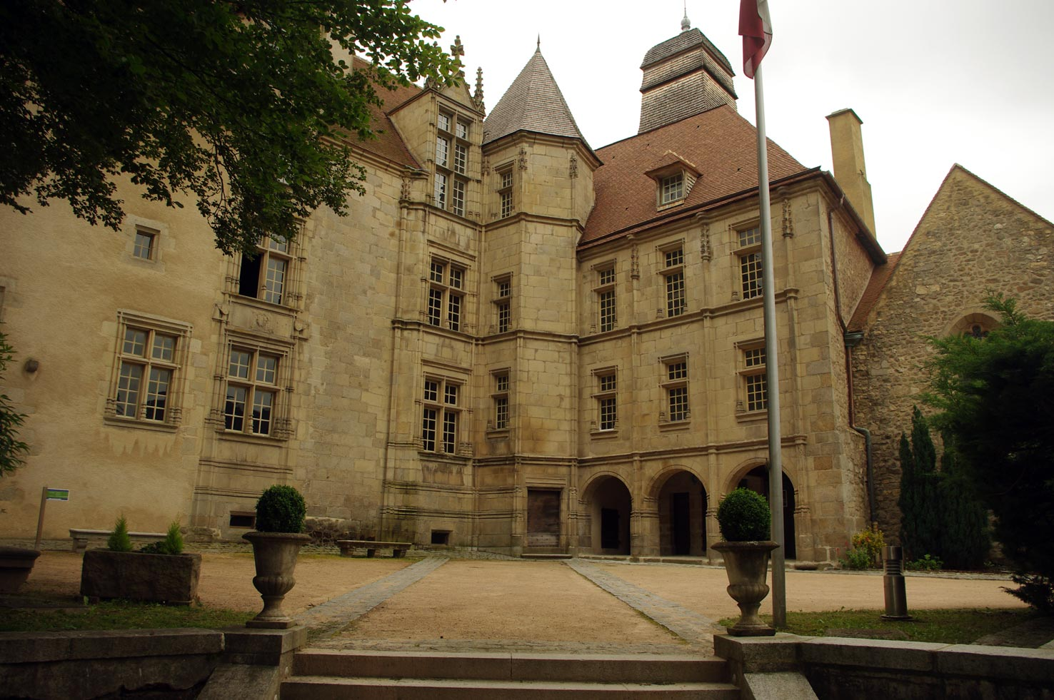 Guéret (Creuse), hôtel des Moneyroux, appelé à tort « château des Comtes de la Marche », XVe s, aujourd'hui conseil départemental de la Creuse (inscrit MH 1926)